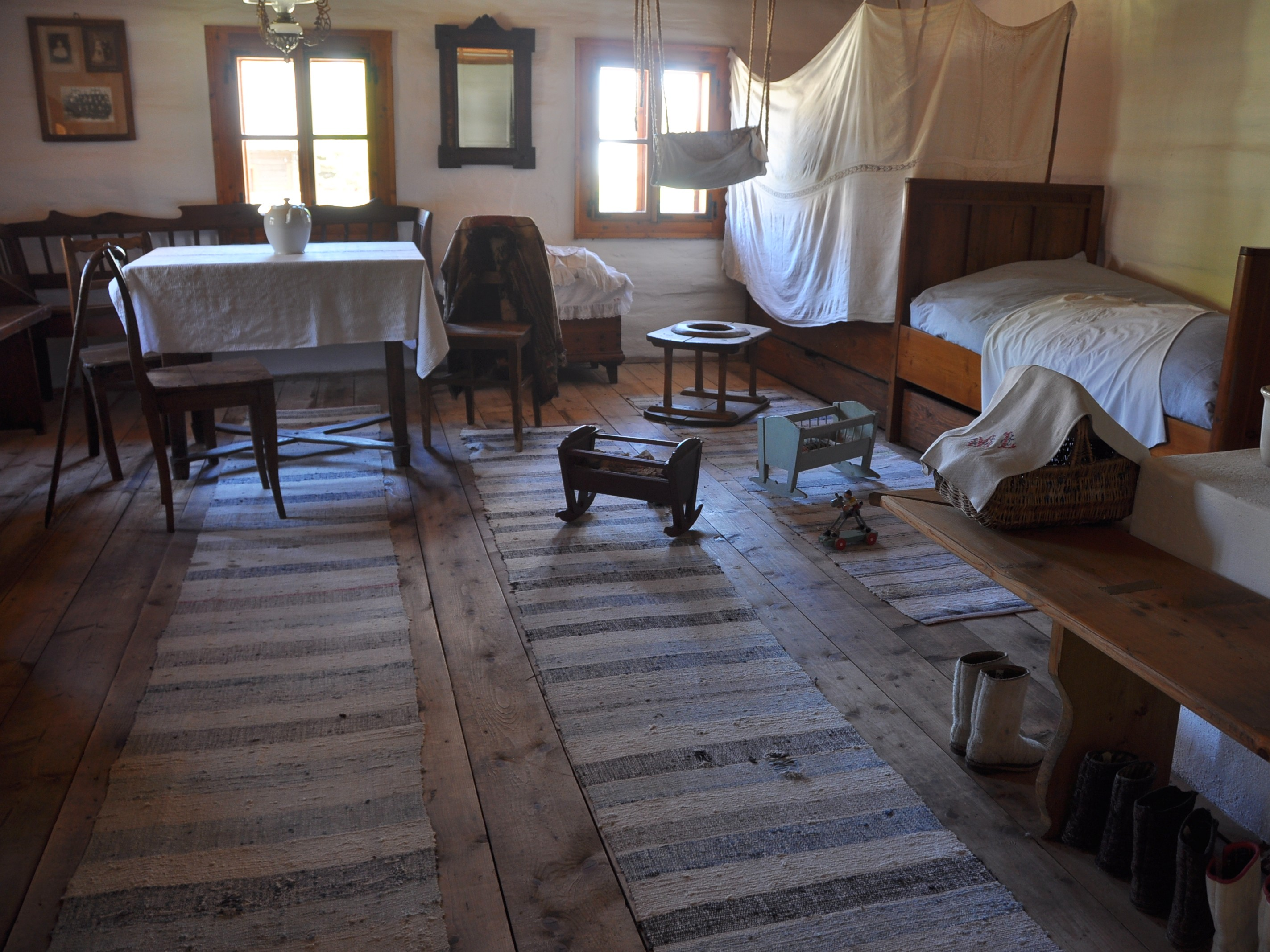 Izba domu stredného roľníka z Liptovskej Sielnice v Múzeu liptovskej dediny v Pribyline. V rohu kútna plachta, oddeľujúca posteľ rodičky.